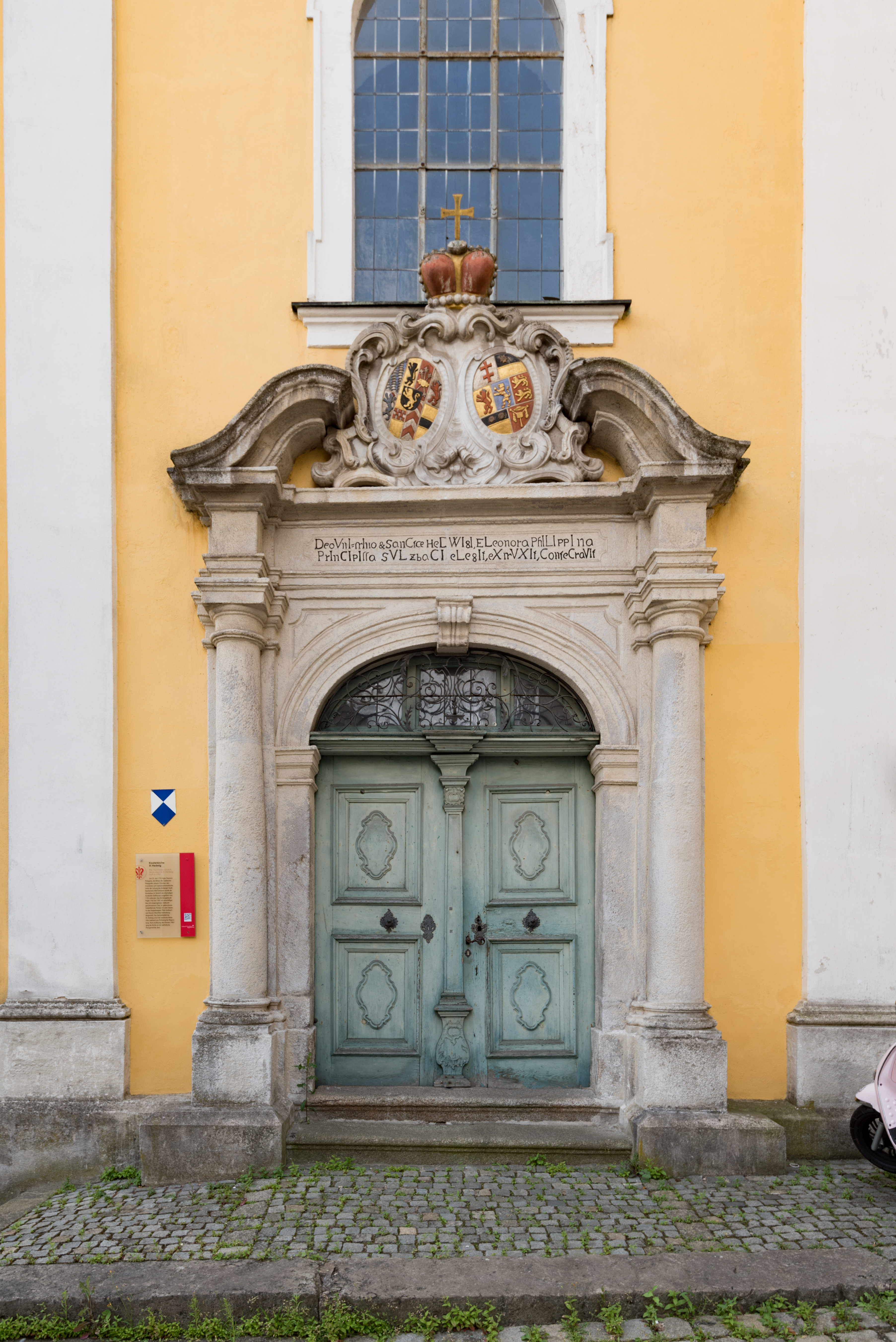 Sulzbach-Rosenberg, Klostergasse 2